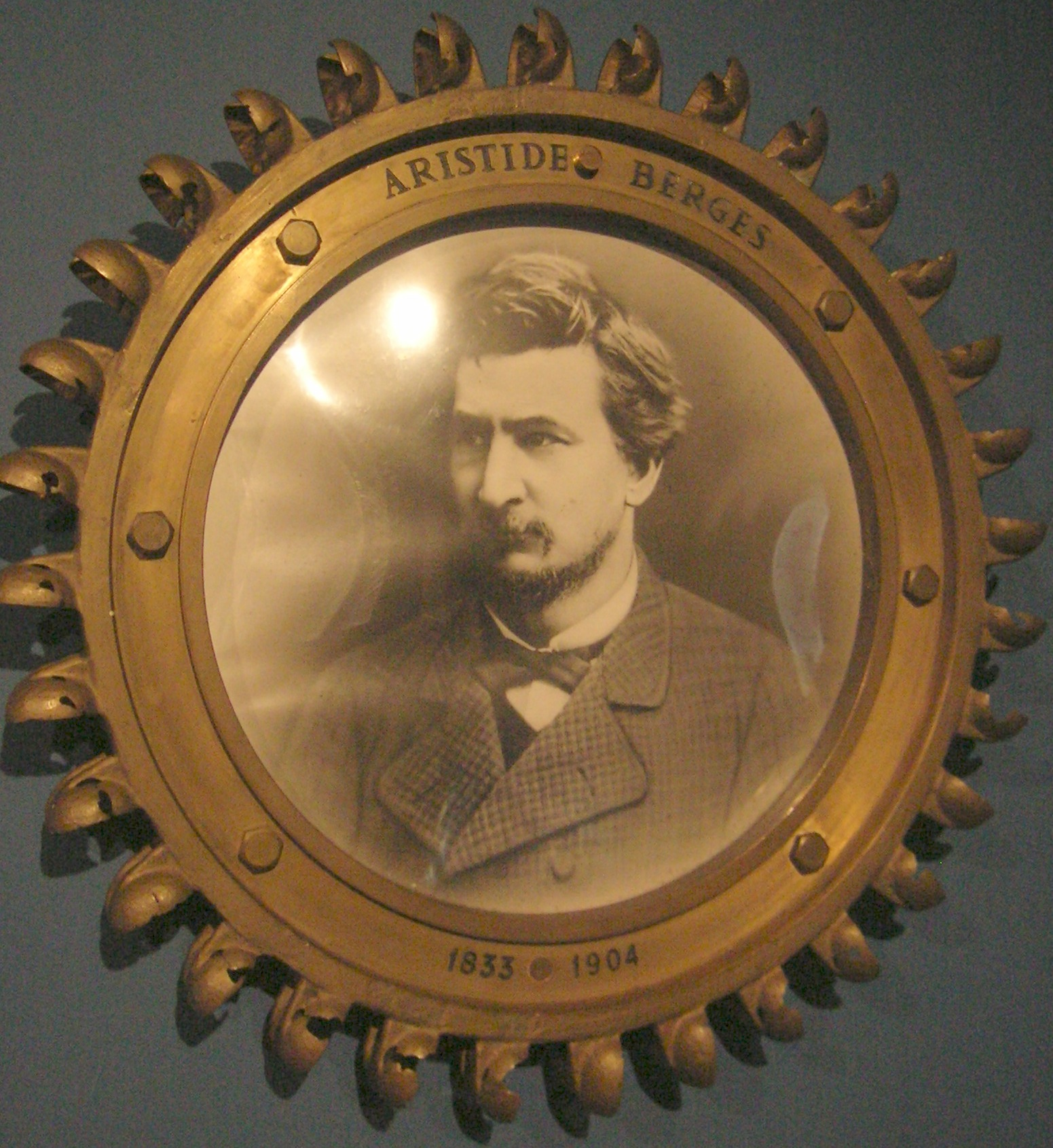 Maison Bergès. Lancey, Villard-Bonnot, Isère, France.